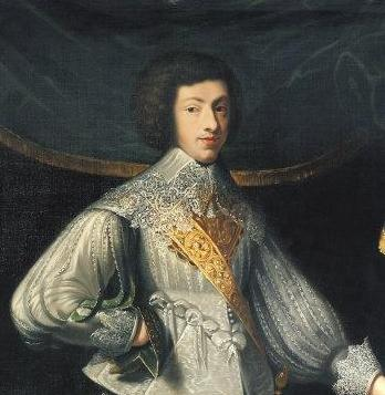 Henri Coiffier-Ruzé d'Effiat, marquis de Cinq-Mars, grand écuyer de France (1620-1642)